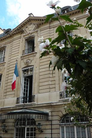 Facade du Centre d'analyse stratégique